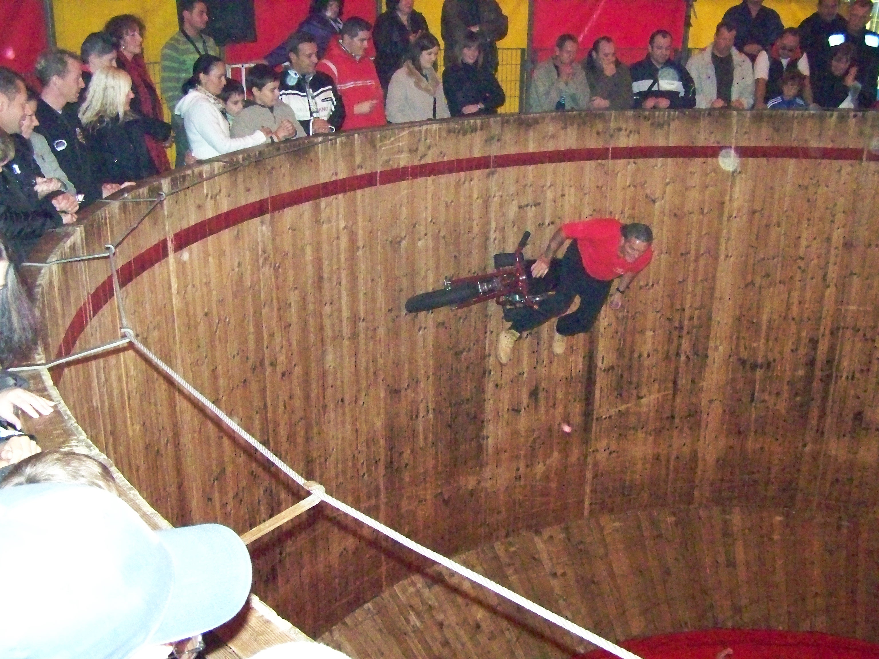 Photo: Holger Baschleben Event: Motorrad-Klassikertreffen im Auto & Technik MUSEUM SINSHEIM